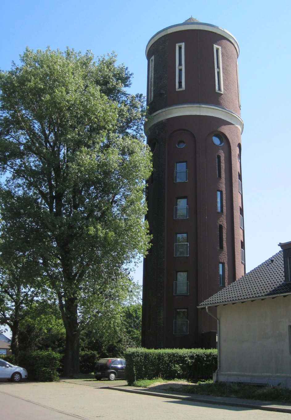 Alter Wasserturm in Merken